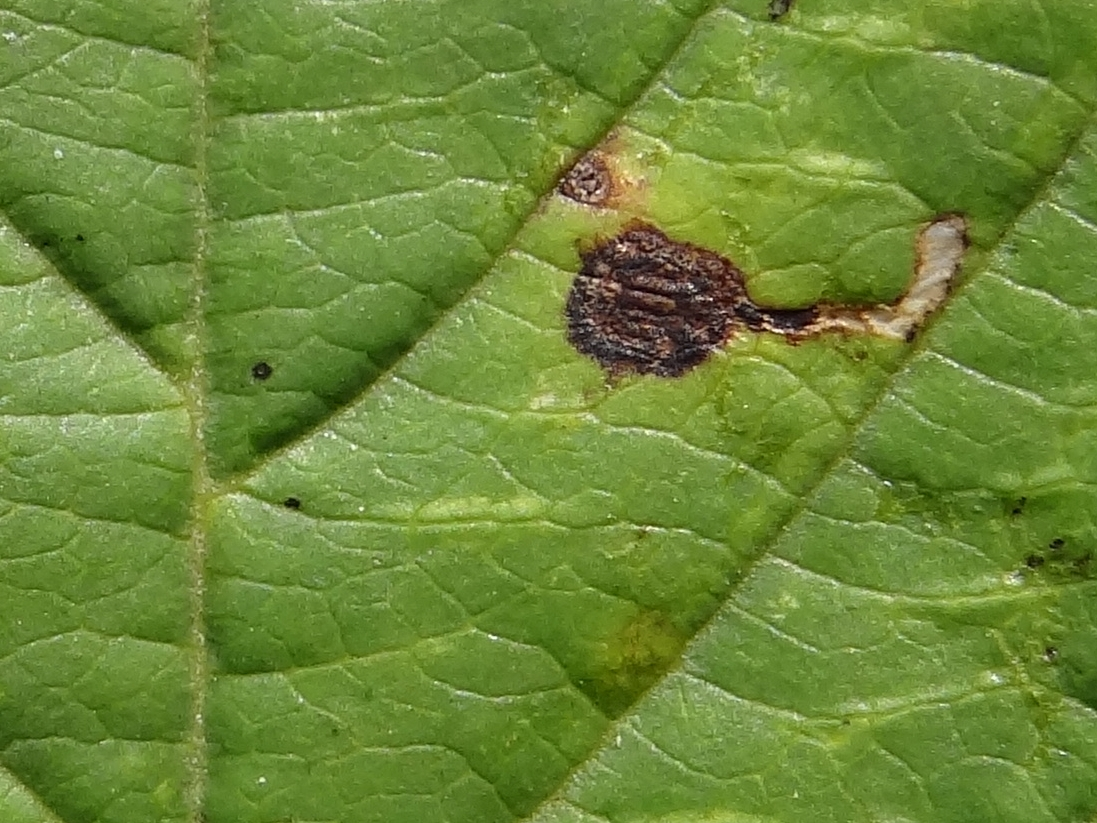 Bucculatrix frangutella. Miner on leaf Frangula alnus. Location: Trzciana (województwo małopolskie)